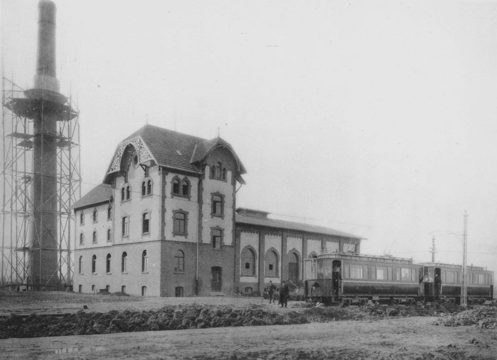 Elektrisches Kraftwerk für die Kleinbahn Düsseldorf-Krefeld, 1898 (Tafel 28). Philipp Zingraf (Ausführung)